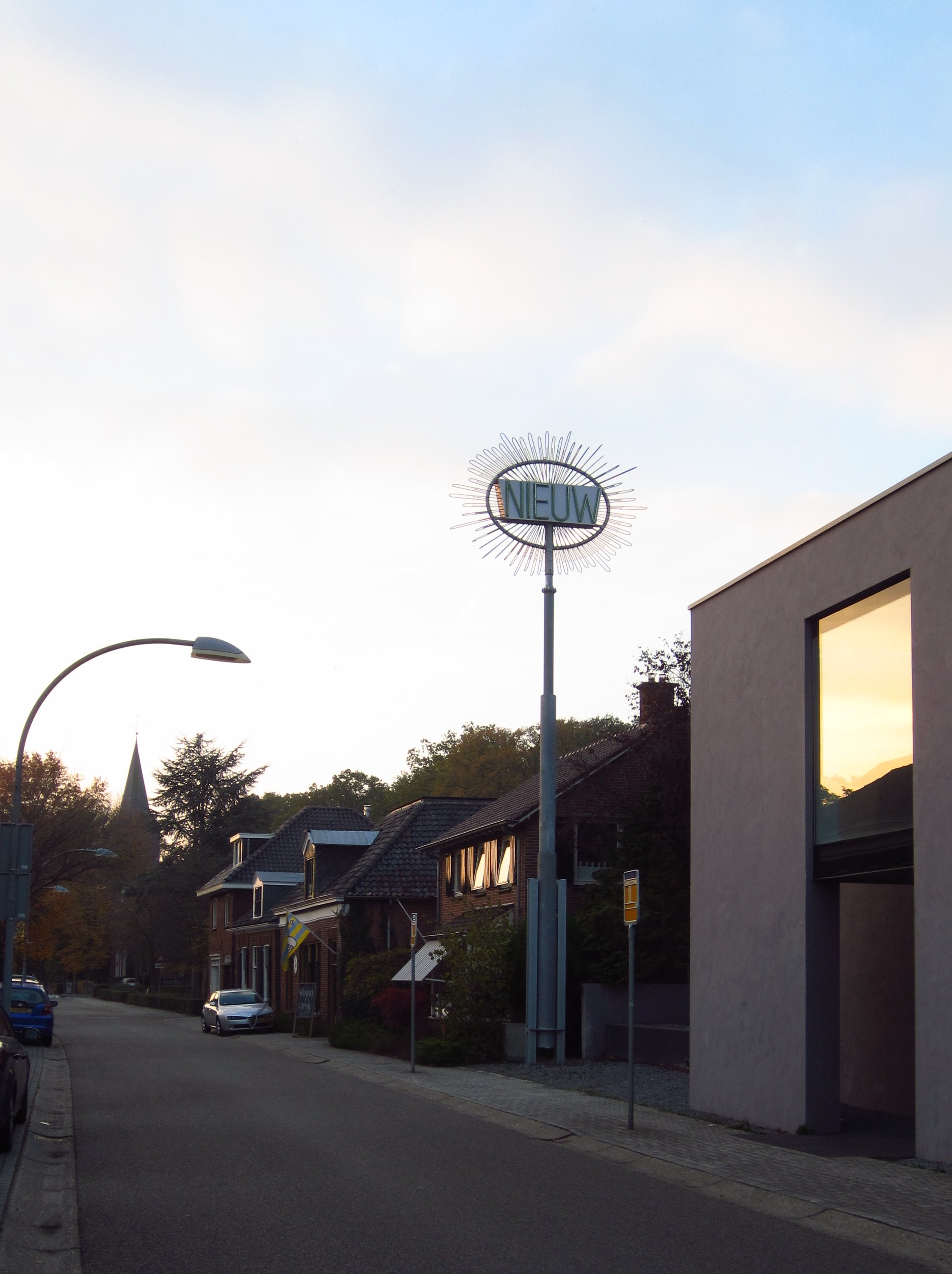 2018-11-04 — NIEUW (1992) John Körmeling — Kunstvereniging Diepenheim